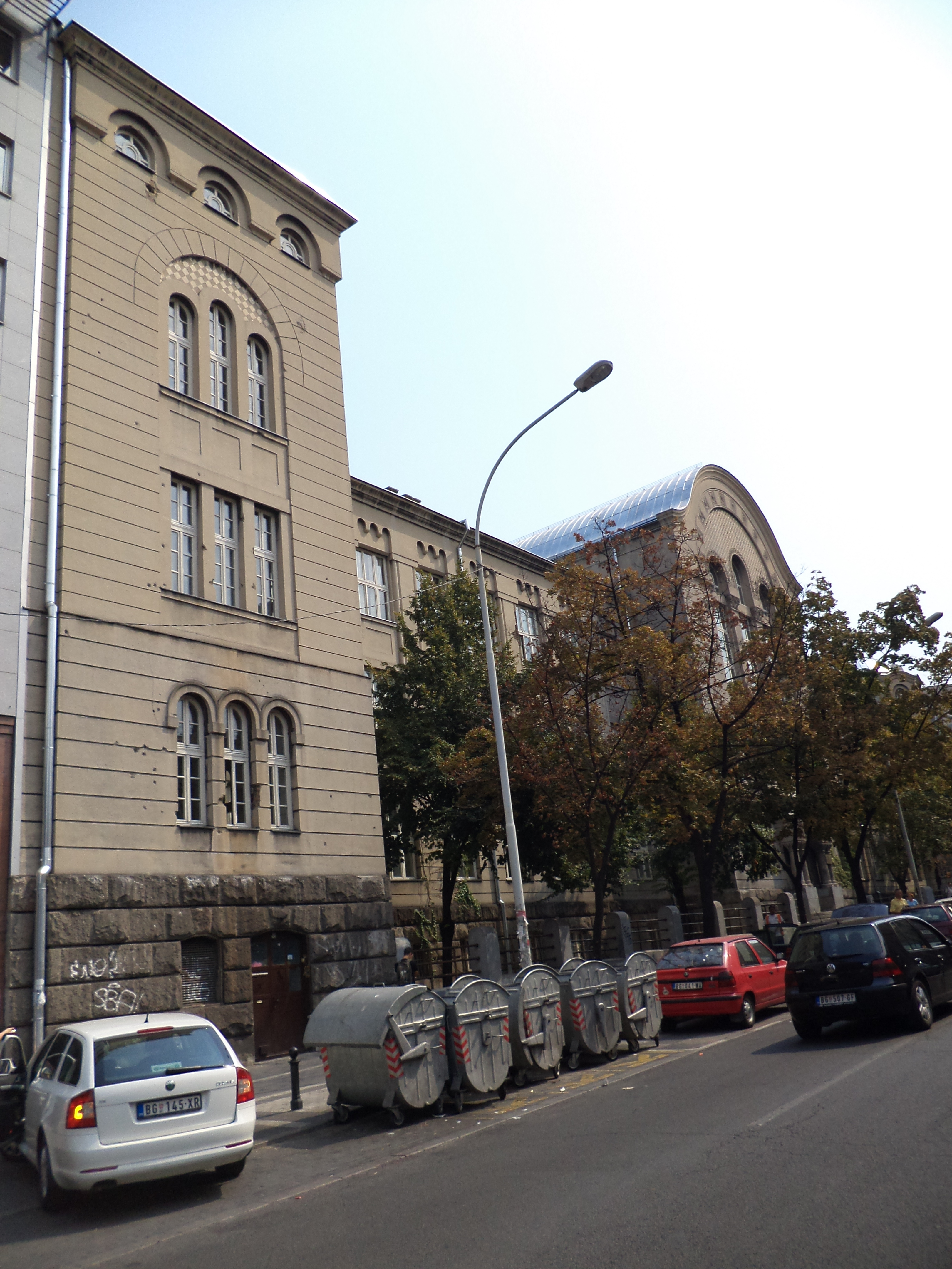 Зграда Друге женске гимназије (Школа „Никола Тесла“), данас